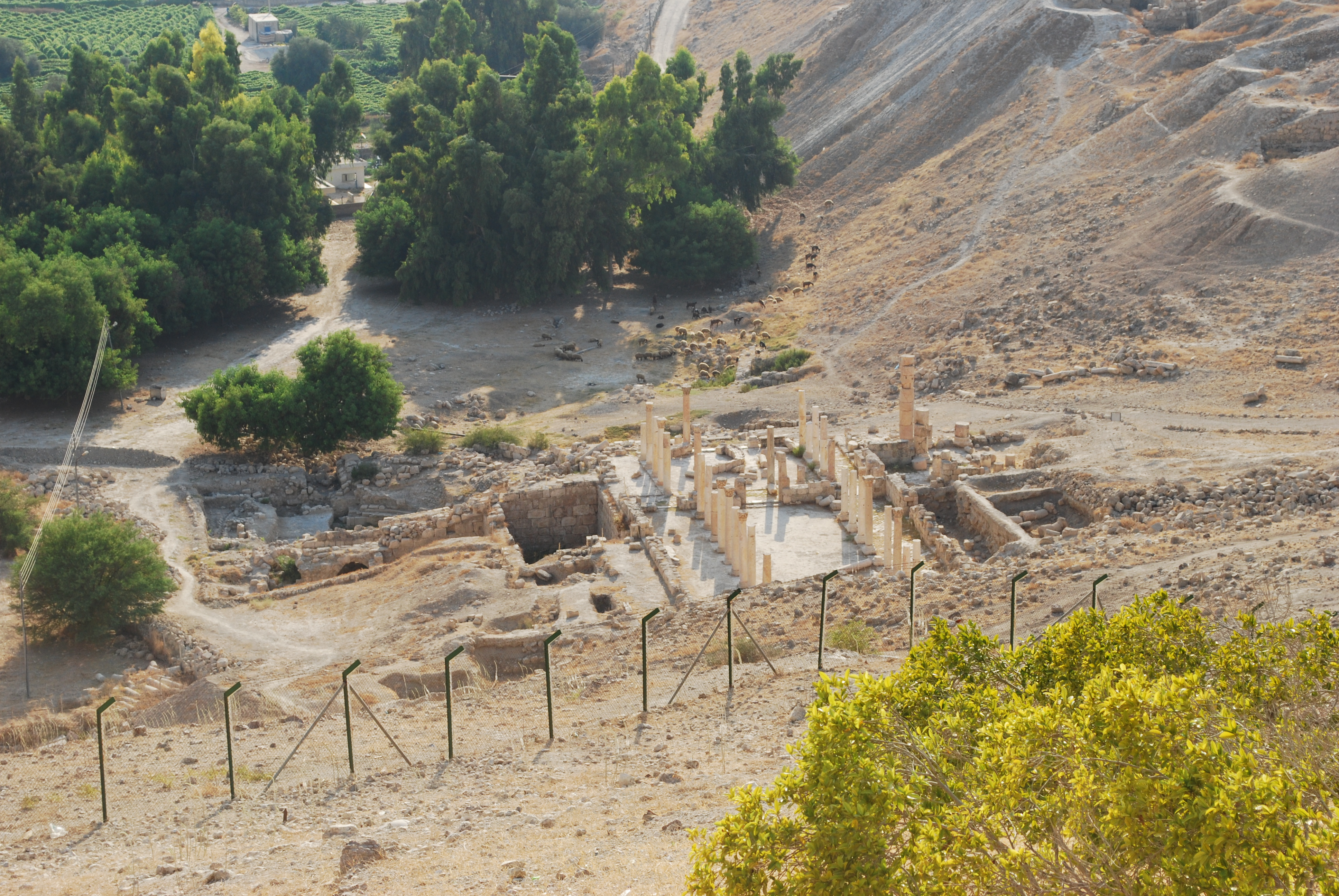 Pella (Tabaqat Fahil) : vue d'ensemble du site.